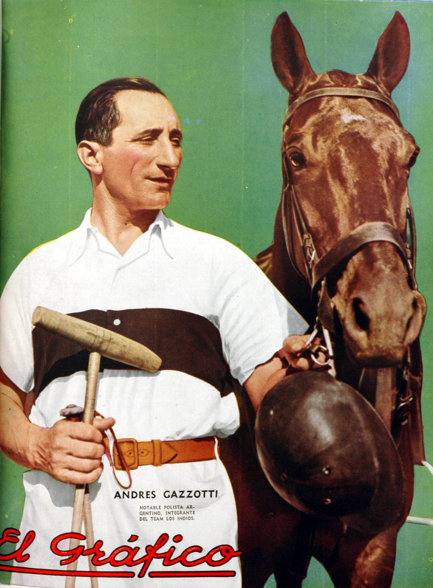 El Grafico del 21 de Diciembre de 1935. Edicion 858